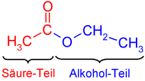 Strukturformel von Ethylacetat unter Verdeutlichung des Säure- und des Alkohol-Anteils (selbst erstellt mit MDL® ISISDraw)